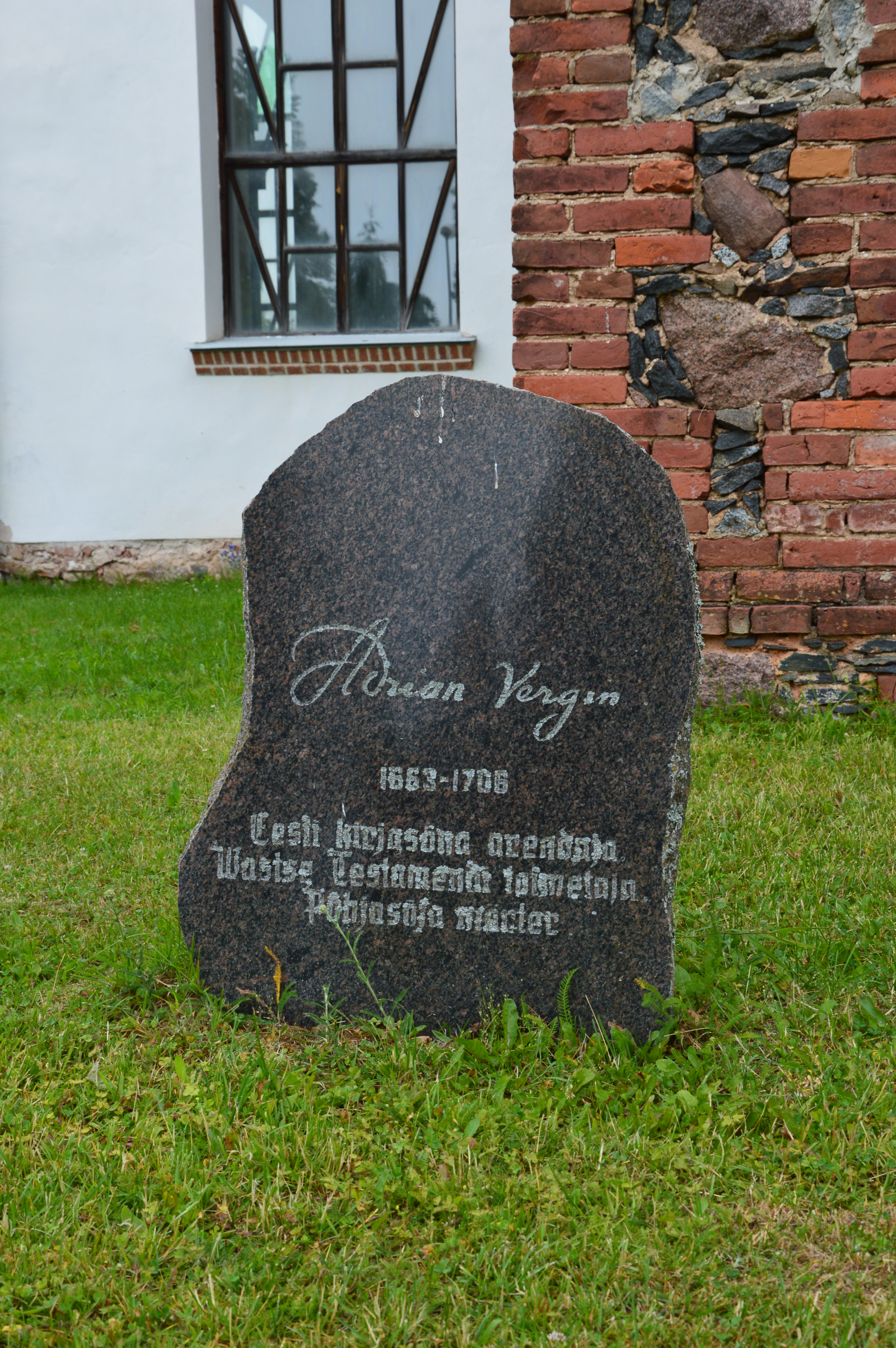 Adrian Vergini mälestuskivi Kambja kiriku kõrval.